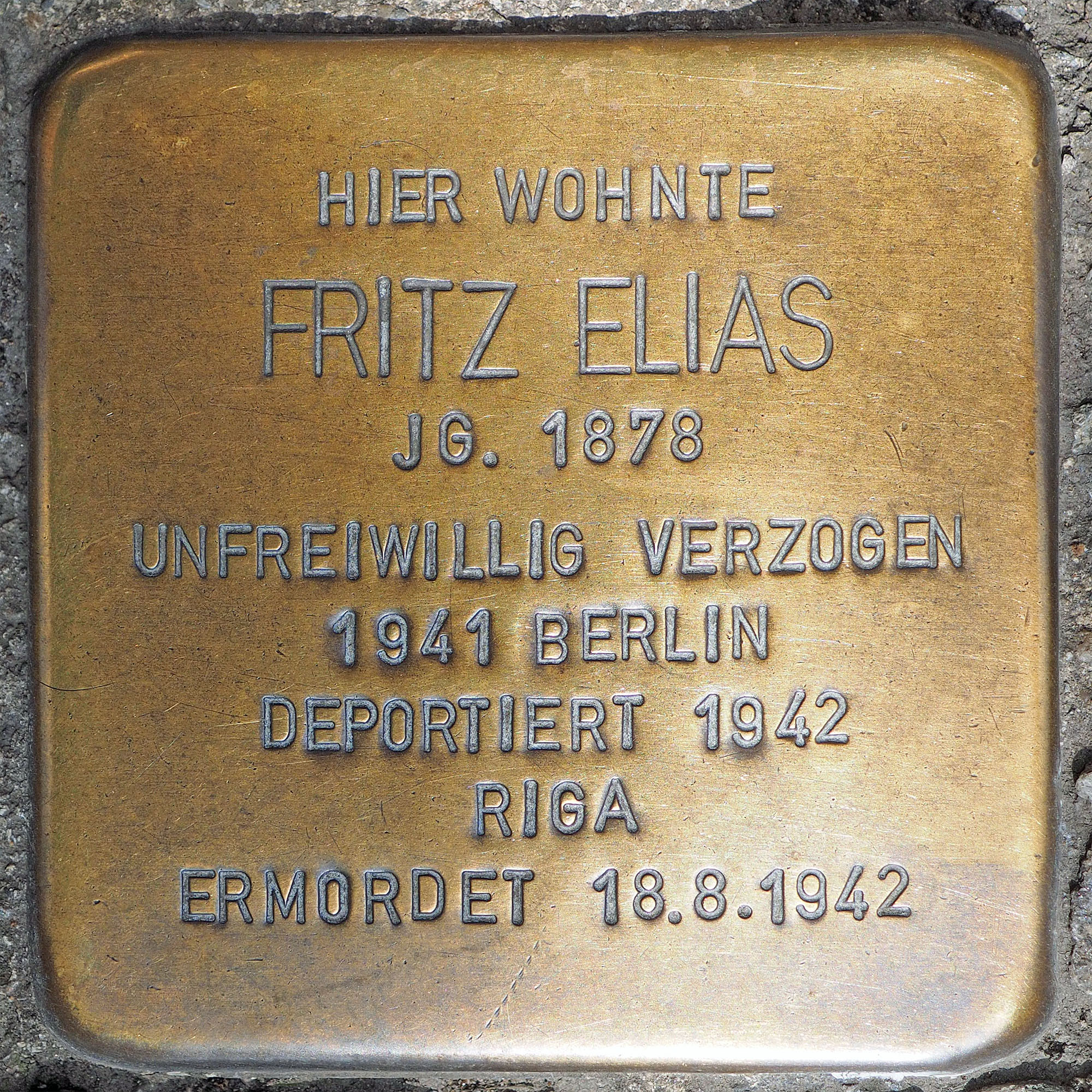 Stolperstein in Geldern Markt 7 für Fritz Elias